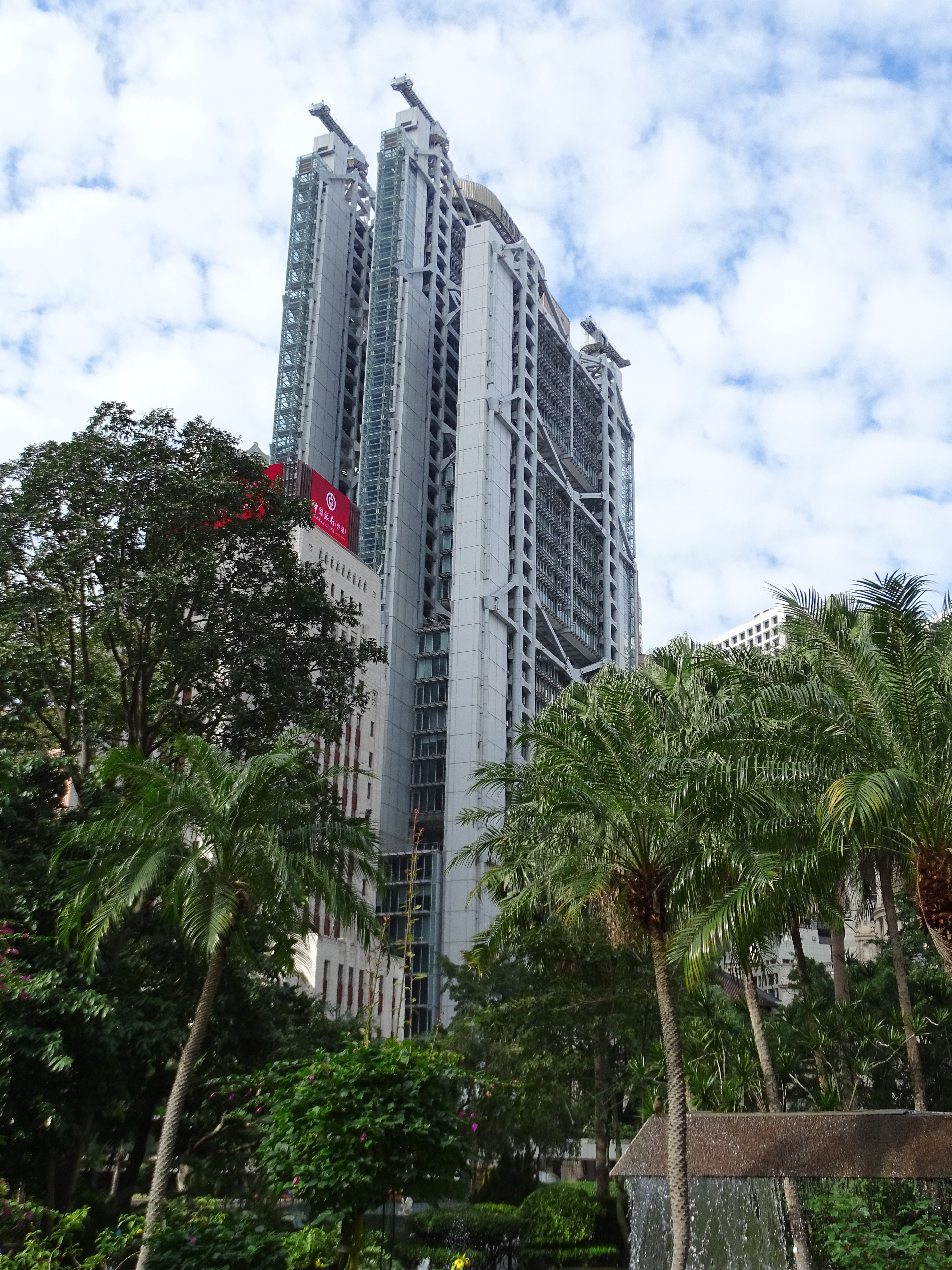 HSBC Main Building, headquarters building of The Hongkong and Shanghai Banking Corporation, Statue Square, Hong Kong